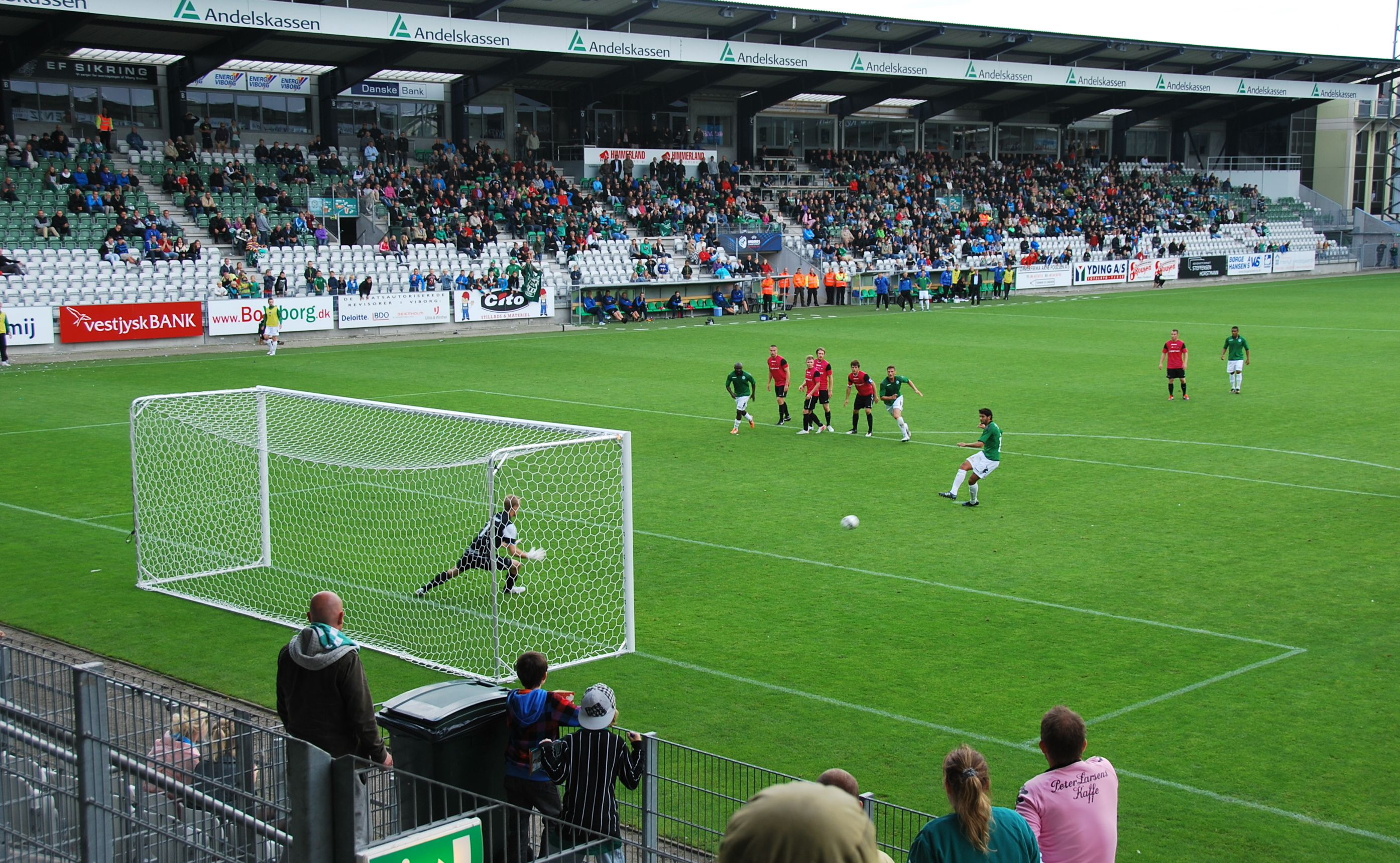 Fodboldspilleren Eduardo Delani fra Viborg FF. Her scorer han på straffespark i 1. divisionskampen mod FC Roskilde på Viborg Stadion.